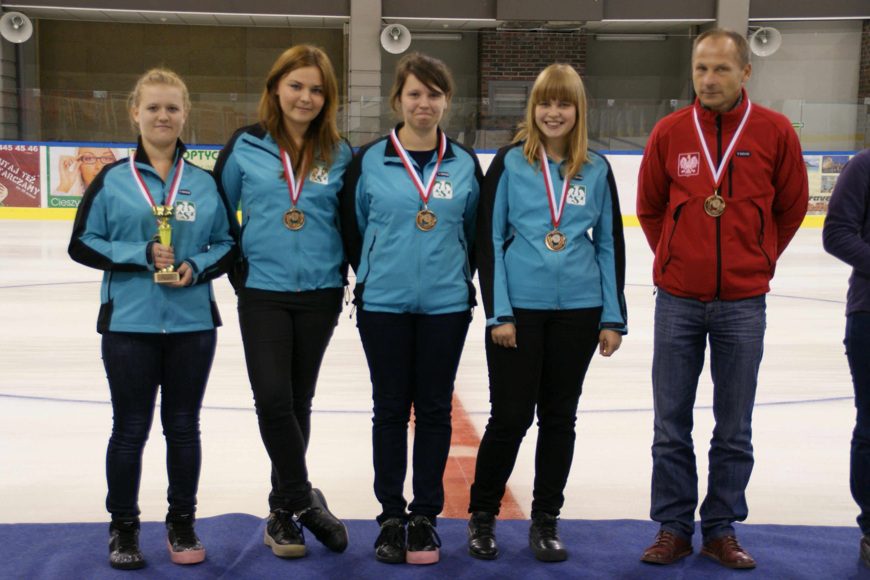 Mistrzynie Polski juniorek w curlingu 2012. Od lewej: Marta Pluta (s), Marta Malinowska, Joanna Benet, Ewa Stych